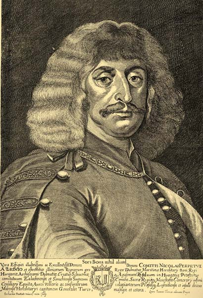 Comites Nicolai Azrinio (Zrinyi Miklós -Niklos Zrinio-) grabado de Gerard Bouttats, como grabador de la Universidad de Viena, por pintura "ad vivum" de Joannes Thomas